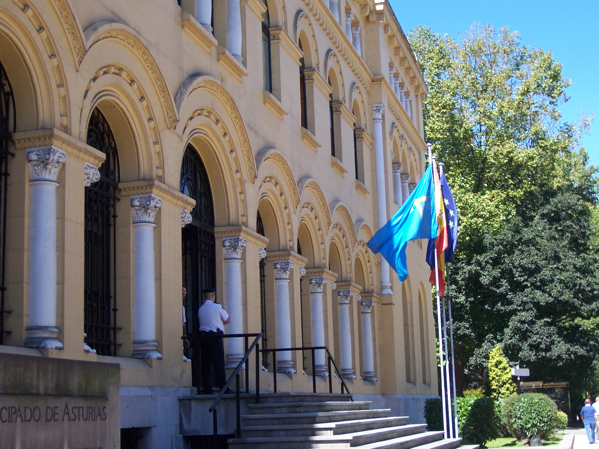 Sede de la Presidencia del Gobierno del Principado de Asturias, Oviedo.